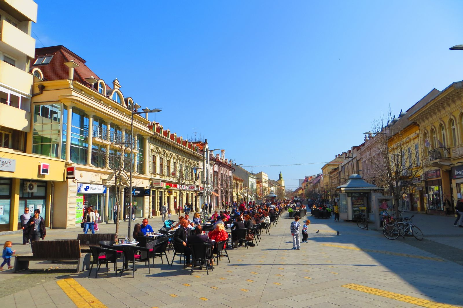 Ulica Kralja Aleksandra I Karađorđevića